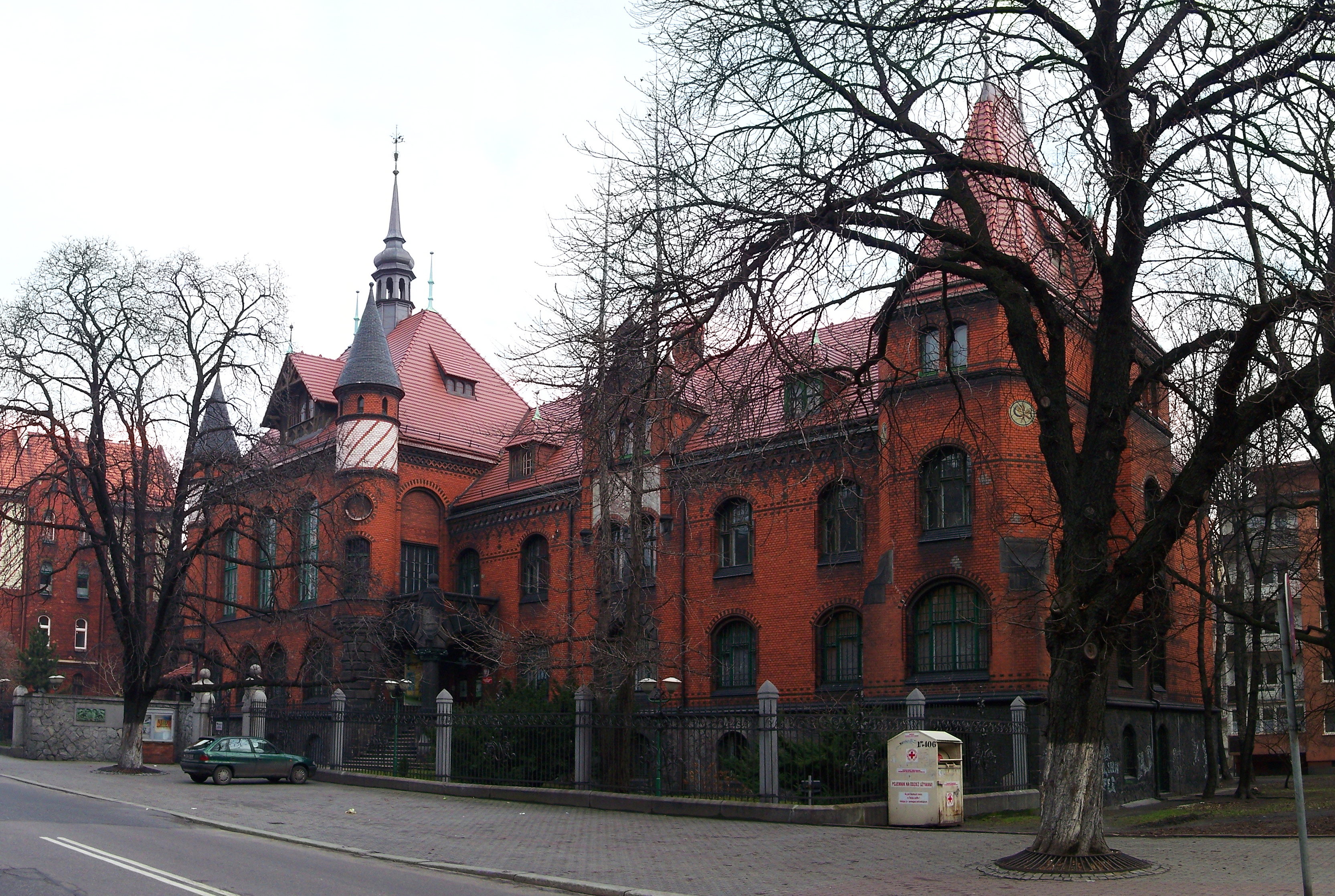 Filia Muzeum Górnośląskiego w Bytomiu. Dawniej gmach starostwa powiatowego w Bytomiu. Projekt: W. Kern.